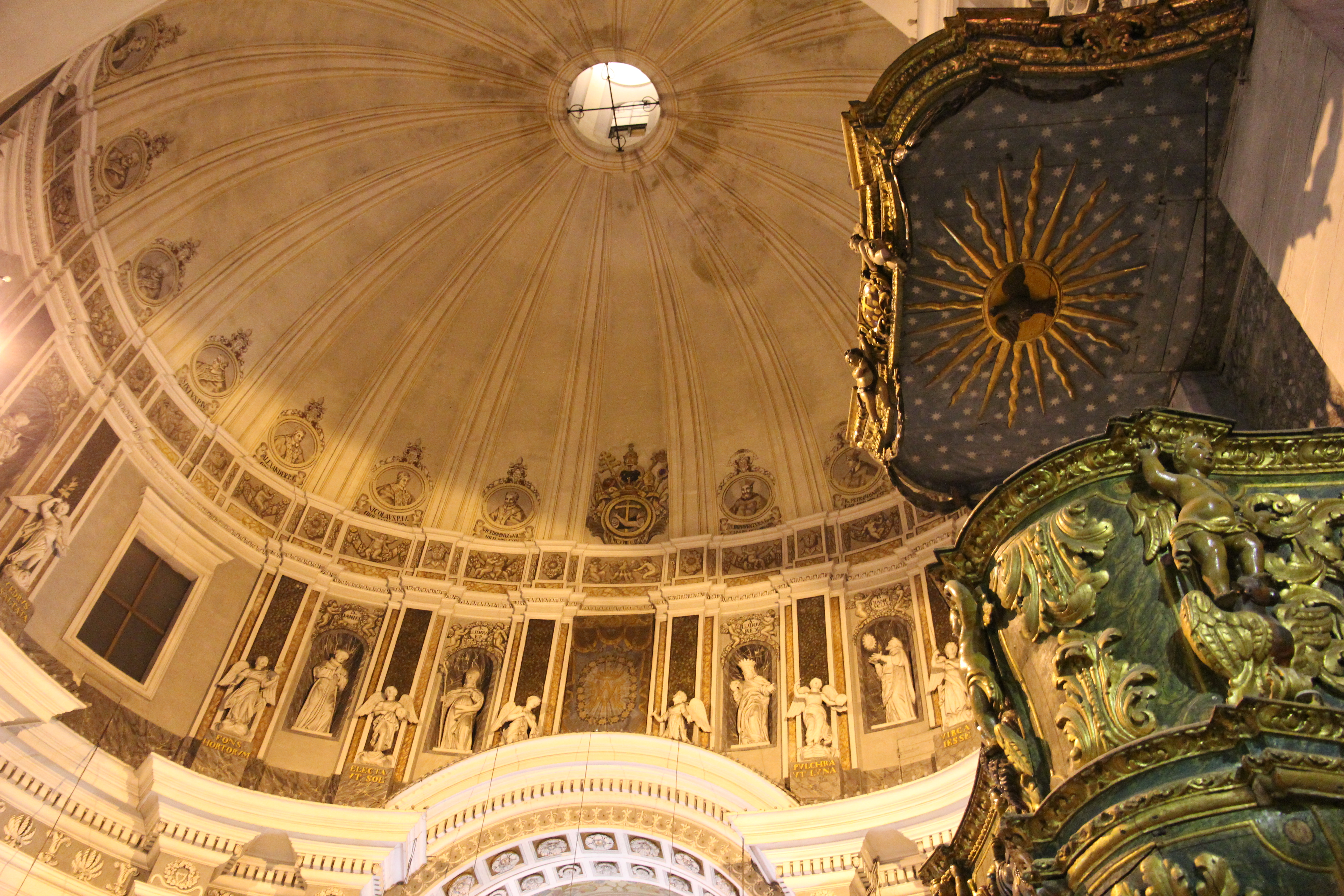 Sassari - Chiesa di Santa Maria di Betlem